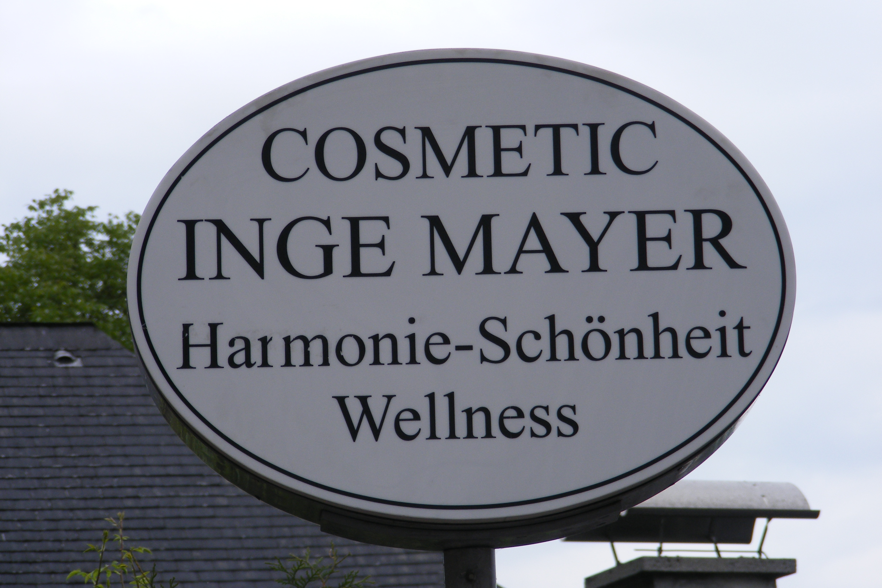 Zumindest seit Februar 2017 nicht mehr existierendes Schild eines Schönheitssalons im Haus Müllner Hauptstraße 2 im Salzburger Stadtteil Mülln; Anglizismus in der Schreibung Cosmetic (dt.: Kosmetik, engl. cosmetics).